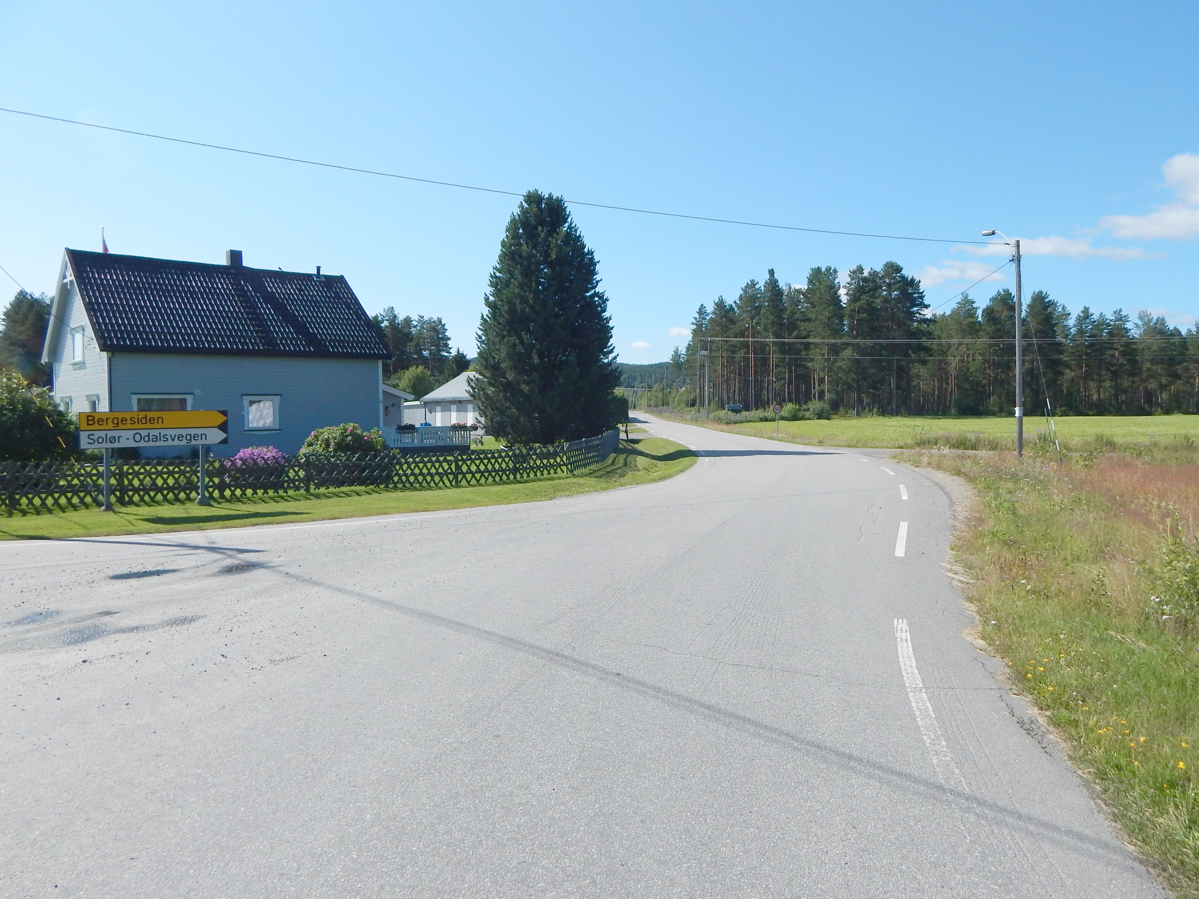 Bergesidevegen (FV445) tar av fra FV210.